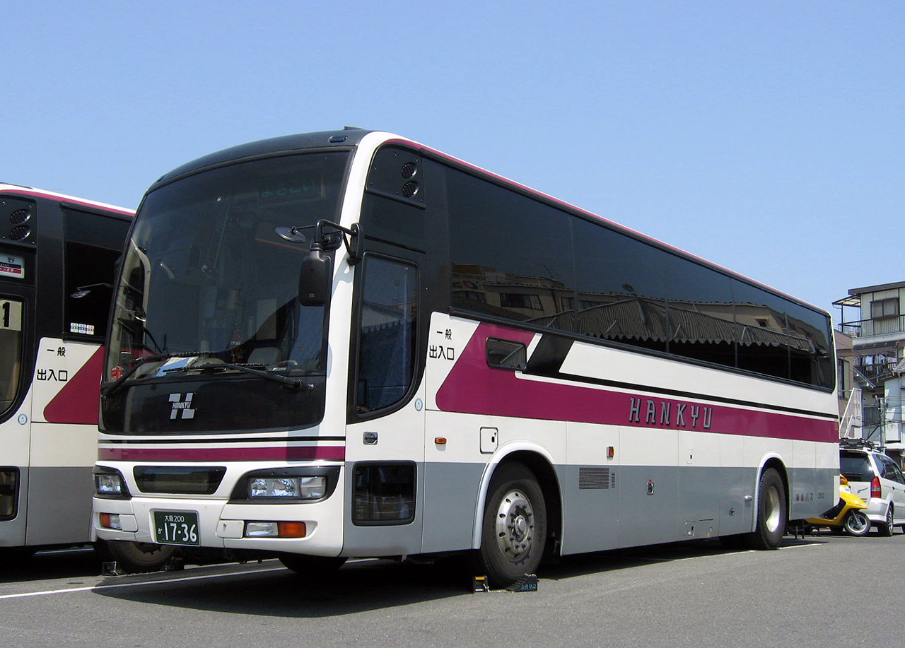 登録番号 大阪200か17-36 社番：05-2892 阪急バス㈱豊中営業所所属 夜行高速路線用車両 2006年5月 豊中市内にて撮影